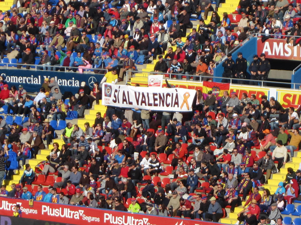 Pancarta "Sí al Valencià" mostrada per la Penya Tòtil en el Llevant-Mallorca del 9 de desembre de 2012